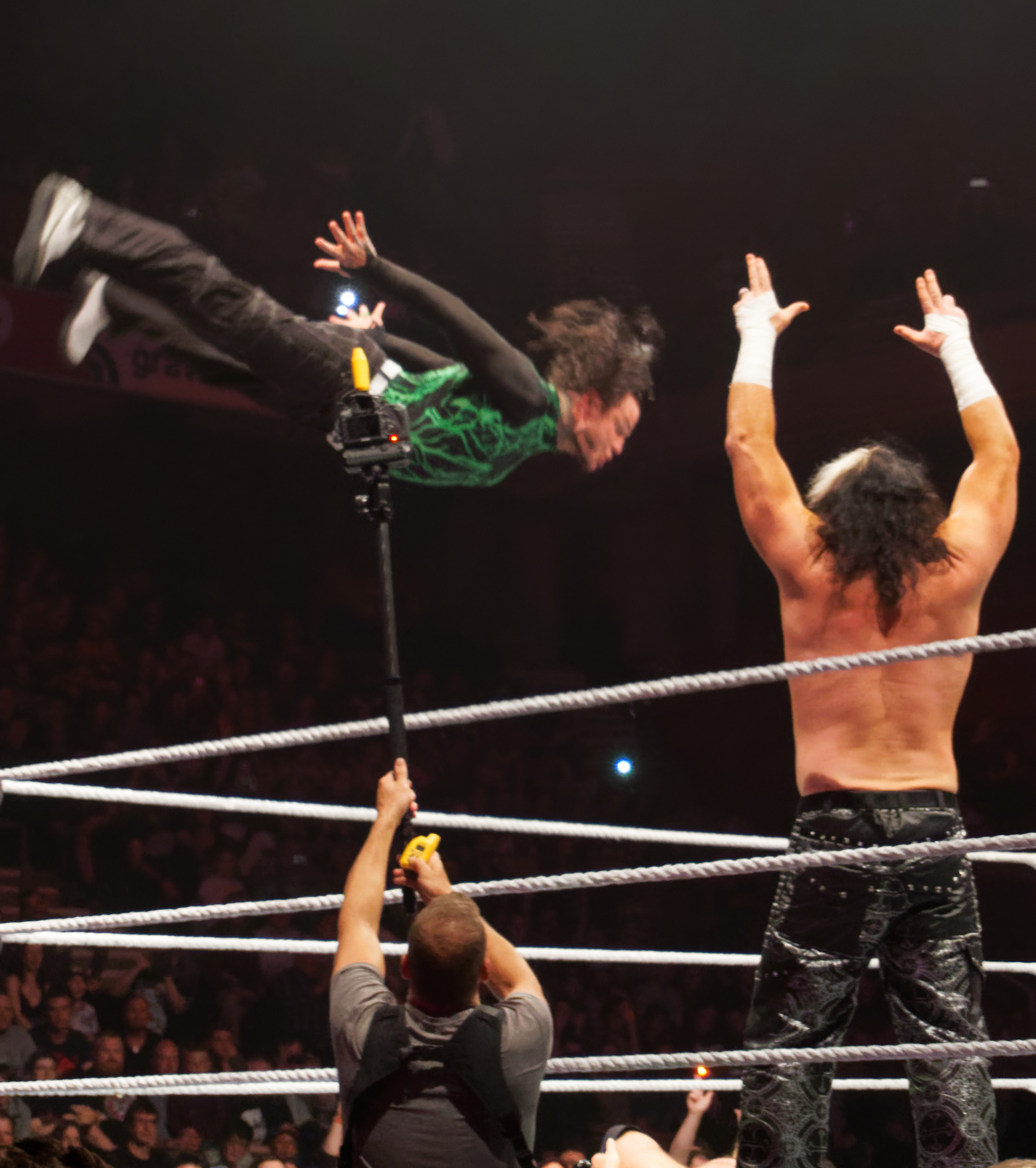 Jeff Hardy (c) & Matt Hardy (c) defeat Big Cass & Enzo Amore, Cesaro & Sheamus (in Triple Threat Match) Info on the match : WWE RAW Tag Team Title ( Le vendredi 12 mai, la WWE Live Tour fera escale au Country Hall a Liege pour le spectacle de catch de l'annee! Au programme: des duels impitoyables et des rencontres captivantes entre les meilleures equipes et les plus grands rivaux. )